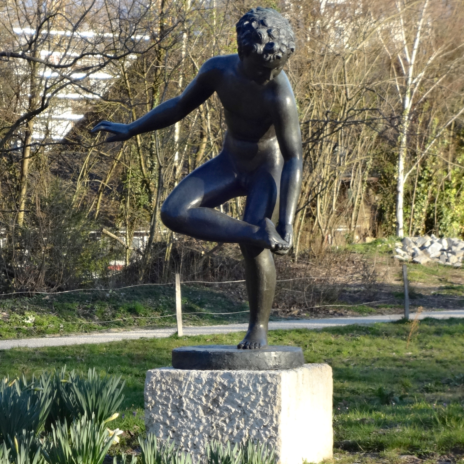 Parc des Franchises. Statue de Lucien Jaeggi (1887-1976) : L'enfant au pied blessé, acquisition du Fonds d'art contemporain de la Ville de Genève (FMAC) en 1982.